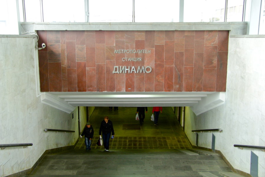 Yekaterinburg Metro (Екатеринбургский метрополитен)